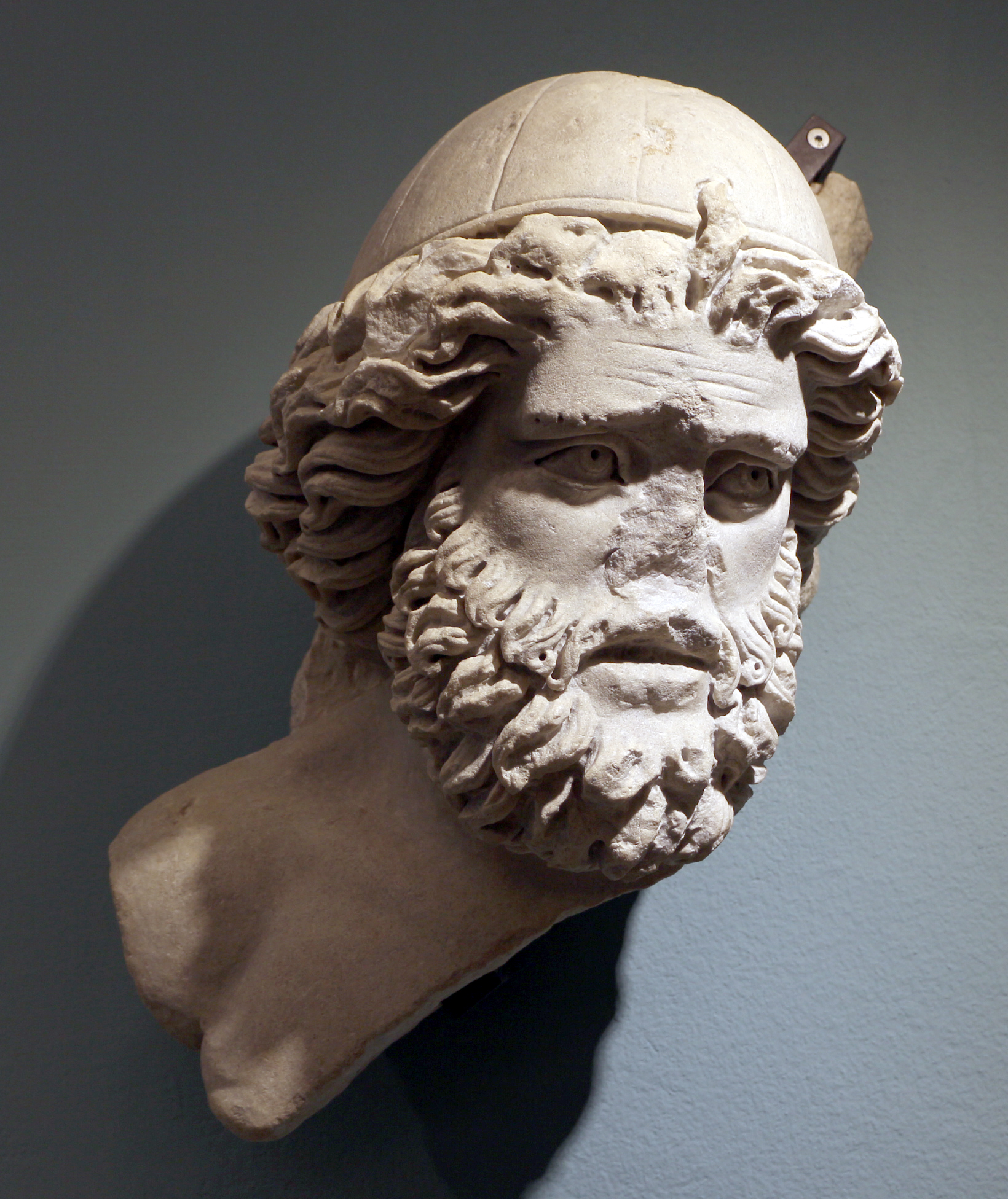 Museo Archeologico Nazionale di Aquileia This is a photo of a monument which is part of cultural heritage of Italy.